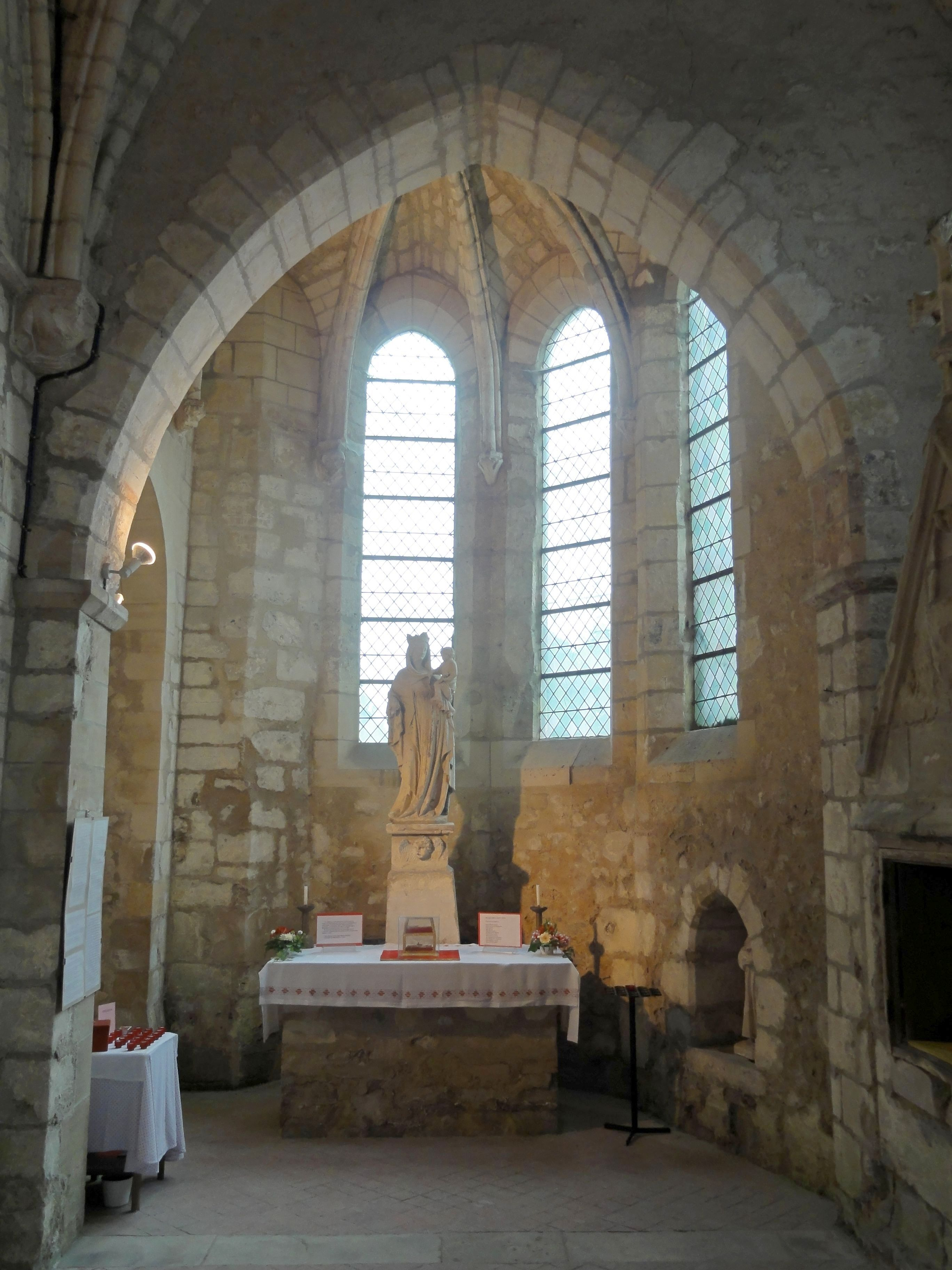 Absidiole sud.